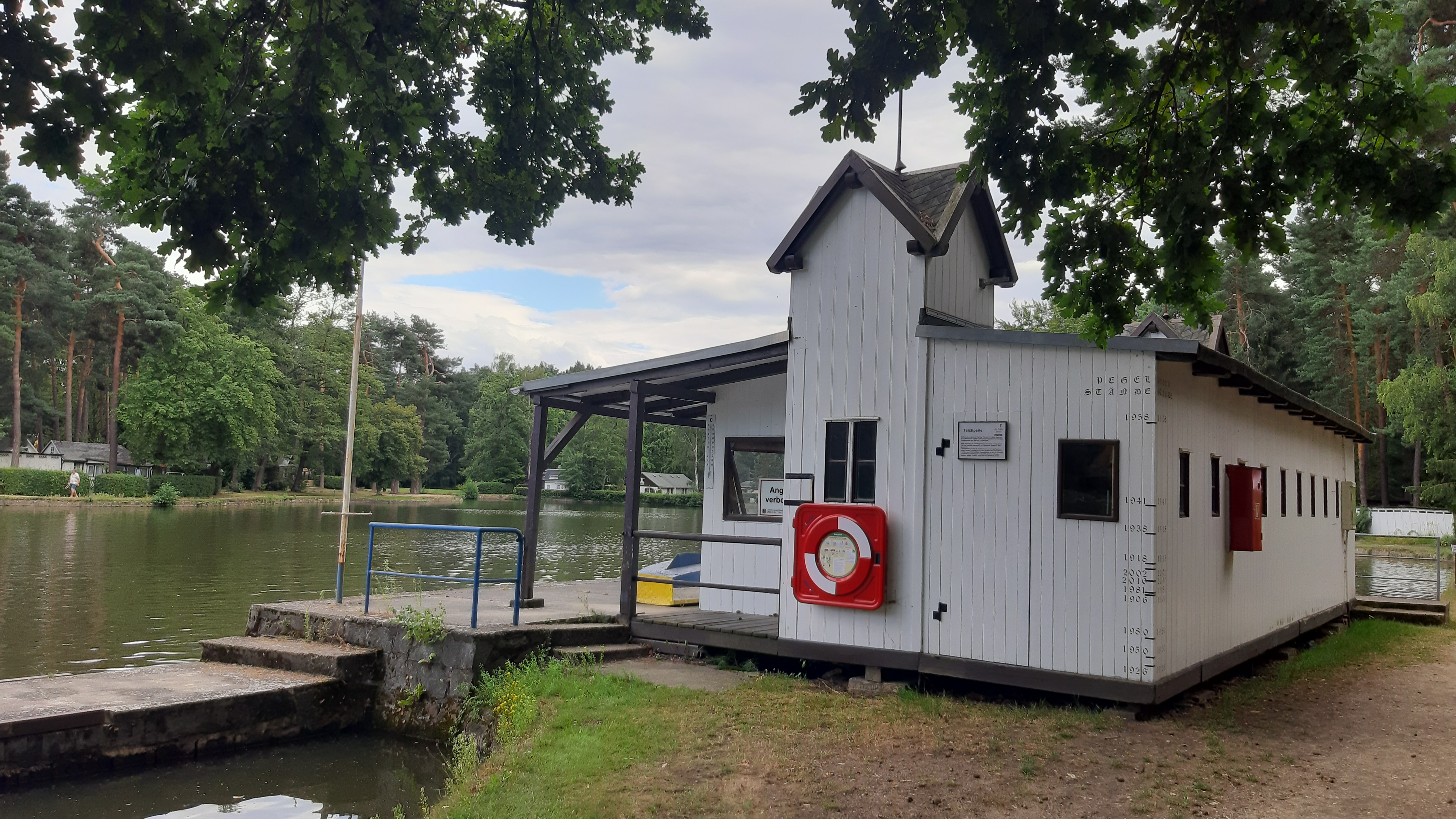 Teichperle im Waldbad Weixdorf mit Hochwassermarken